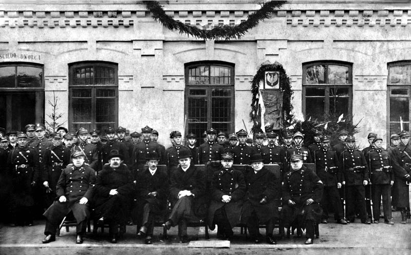 Беларуская (тарашкевіца): Алехнавічы (Alechnavičy). Чыгуначная станцыя